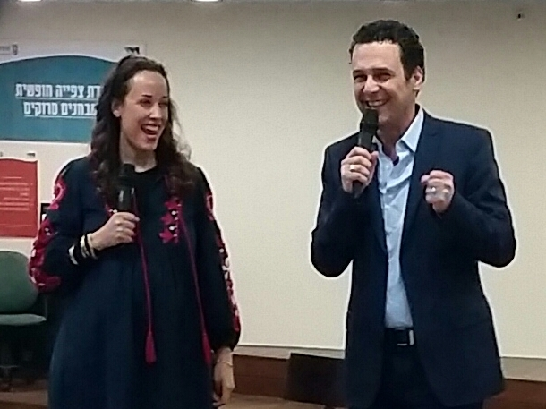 עדן הראל ועודד מנשה מנחים באירוע, טכניון, חיפה, 27 באפריל 2017